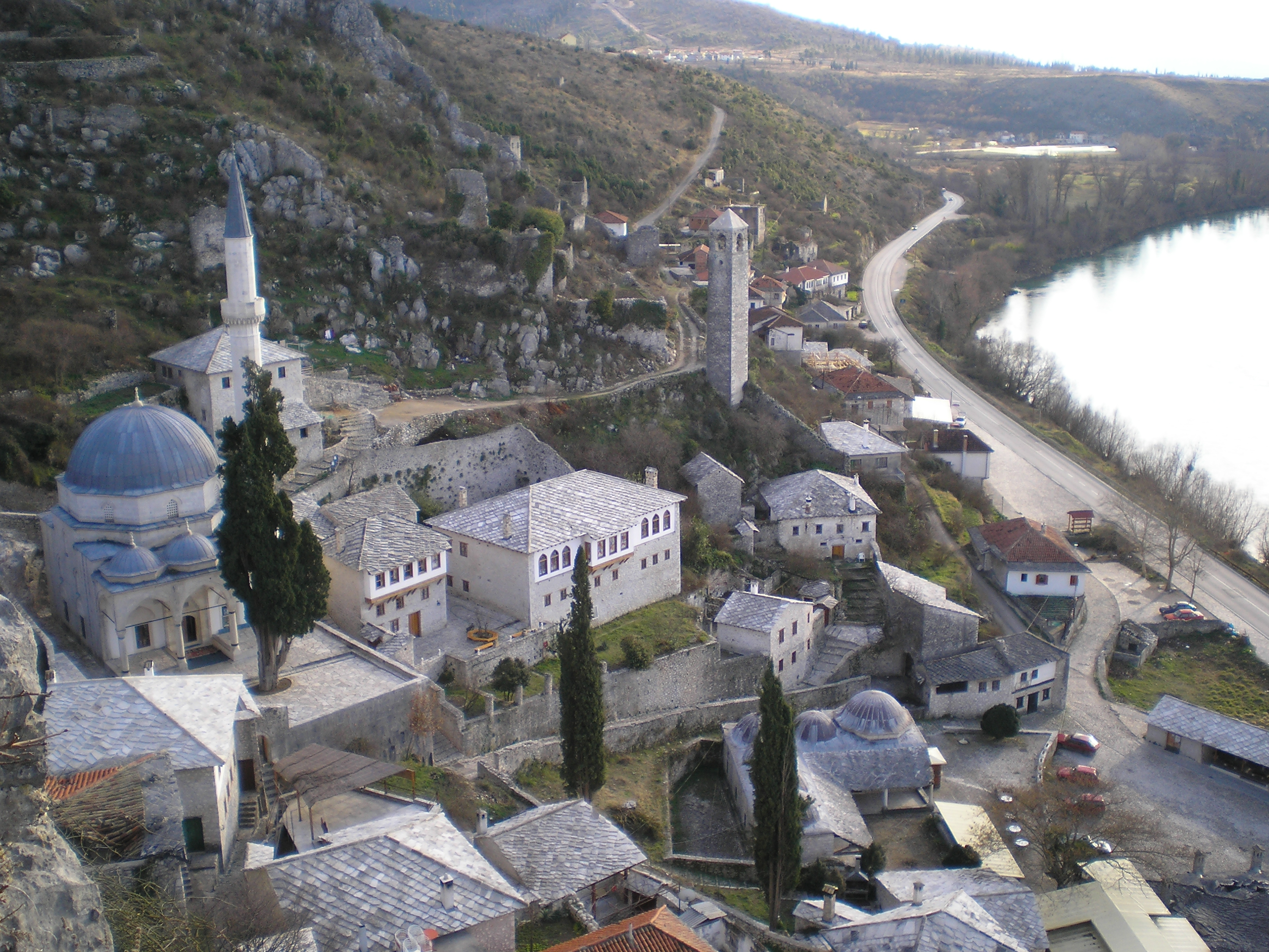 Blick über Počitelj, Bosnien-Herzegowina.